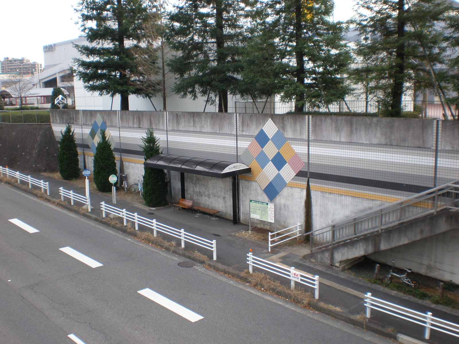 愛知県小牧市にある桃花台センター停留所